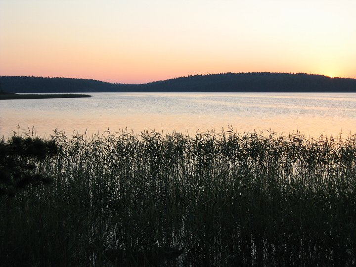 Auringonlaskun näkymä Pohjanpitäjänlahden saaresta, kesä 2003. Huom: Muista säilyttää viittaus kuvaajaan, mikäli käytät kuvaa.